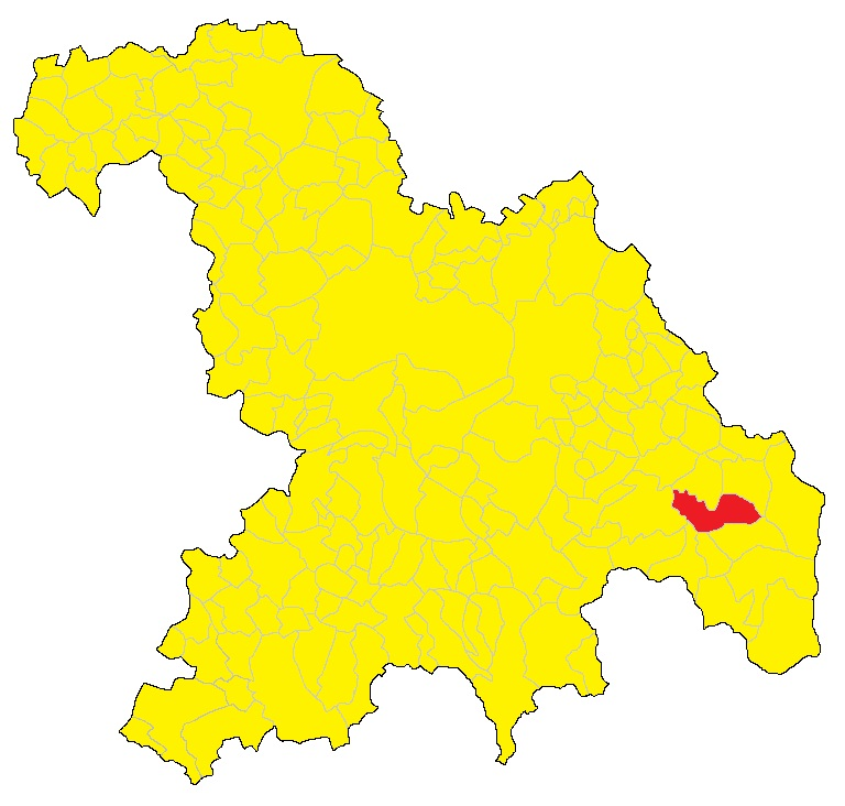 Mappa del comune di Cantalupo Ligure (AL)